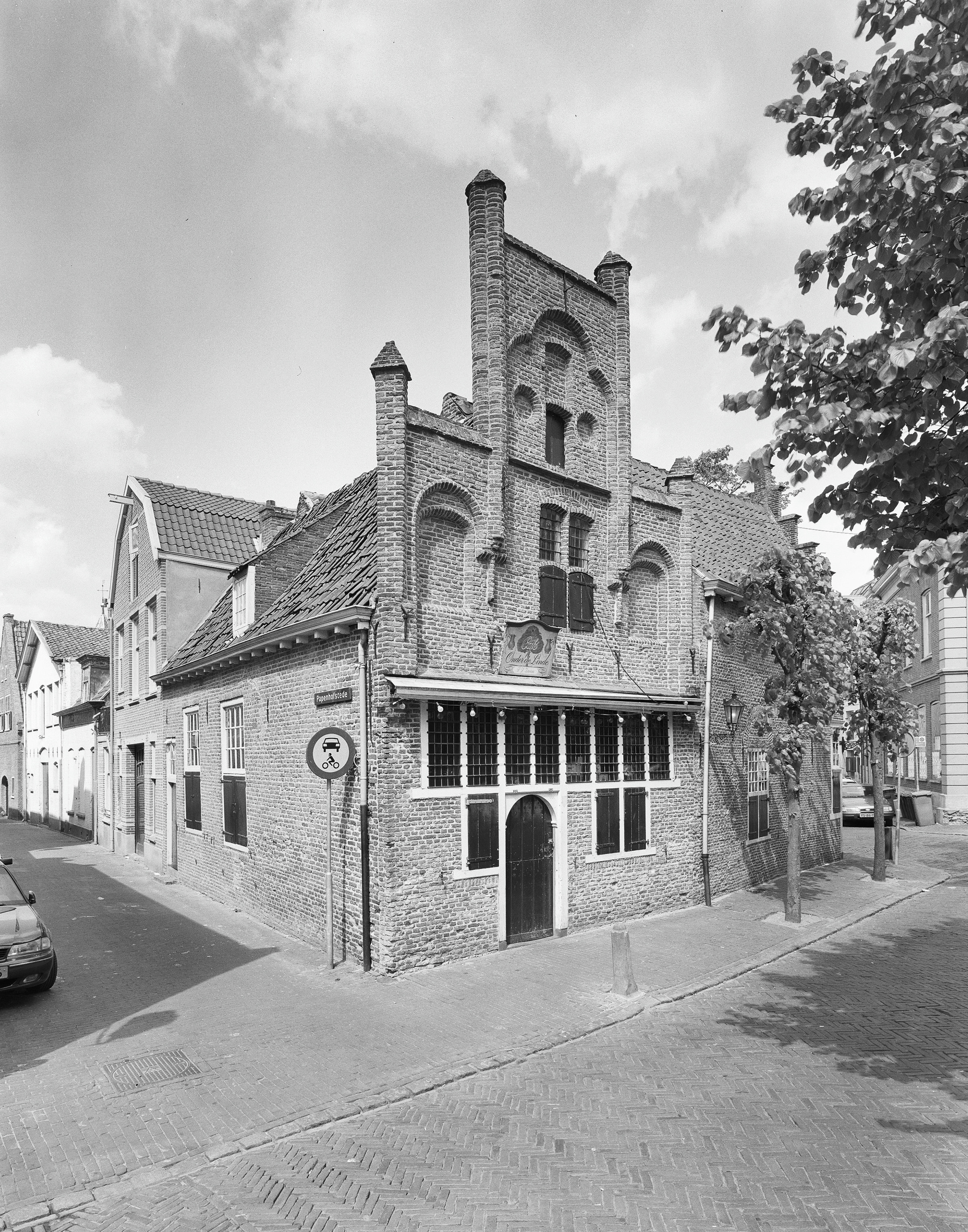 Mandaatshuisje: Exterieur VOORGEVEL, LINKER ZIJGEVEL